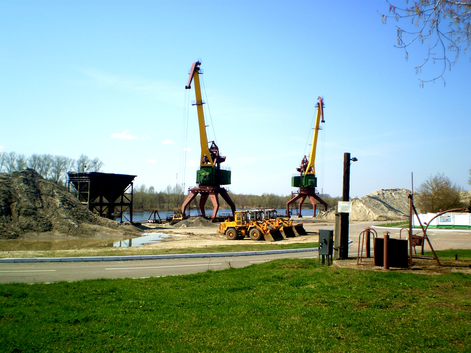 Брэсцкі рачны порт